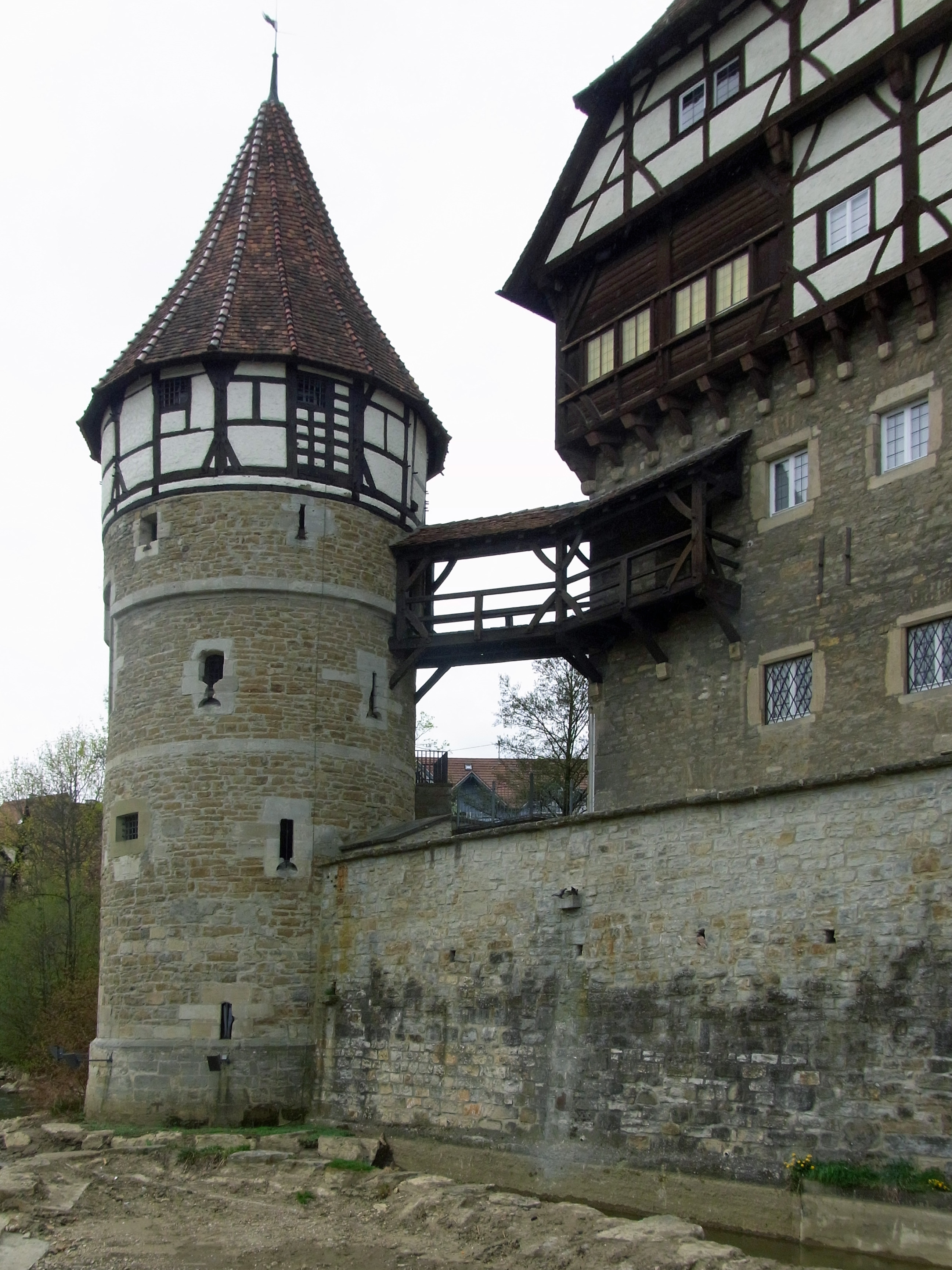 Balingen, Zollernschloss